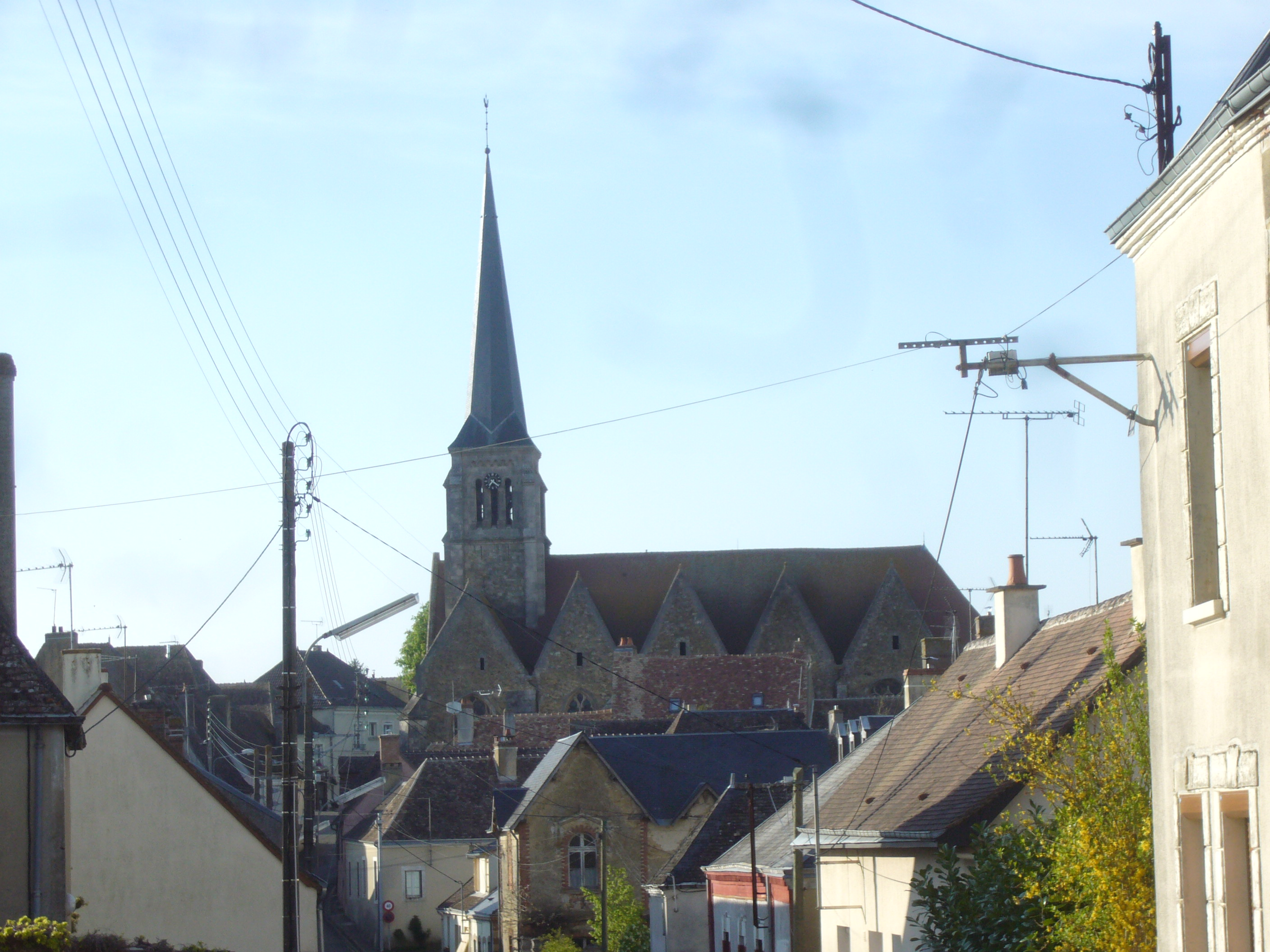 Nogent-le-Bernard et l'église Saint-Jouin.